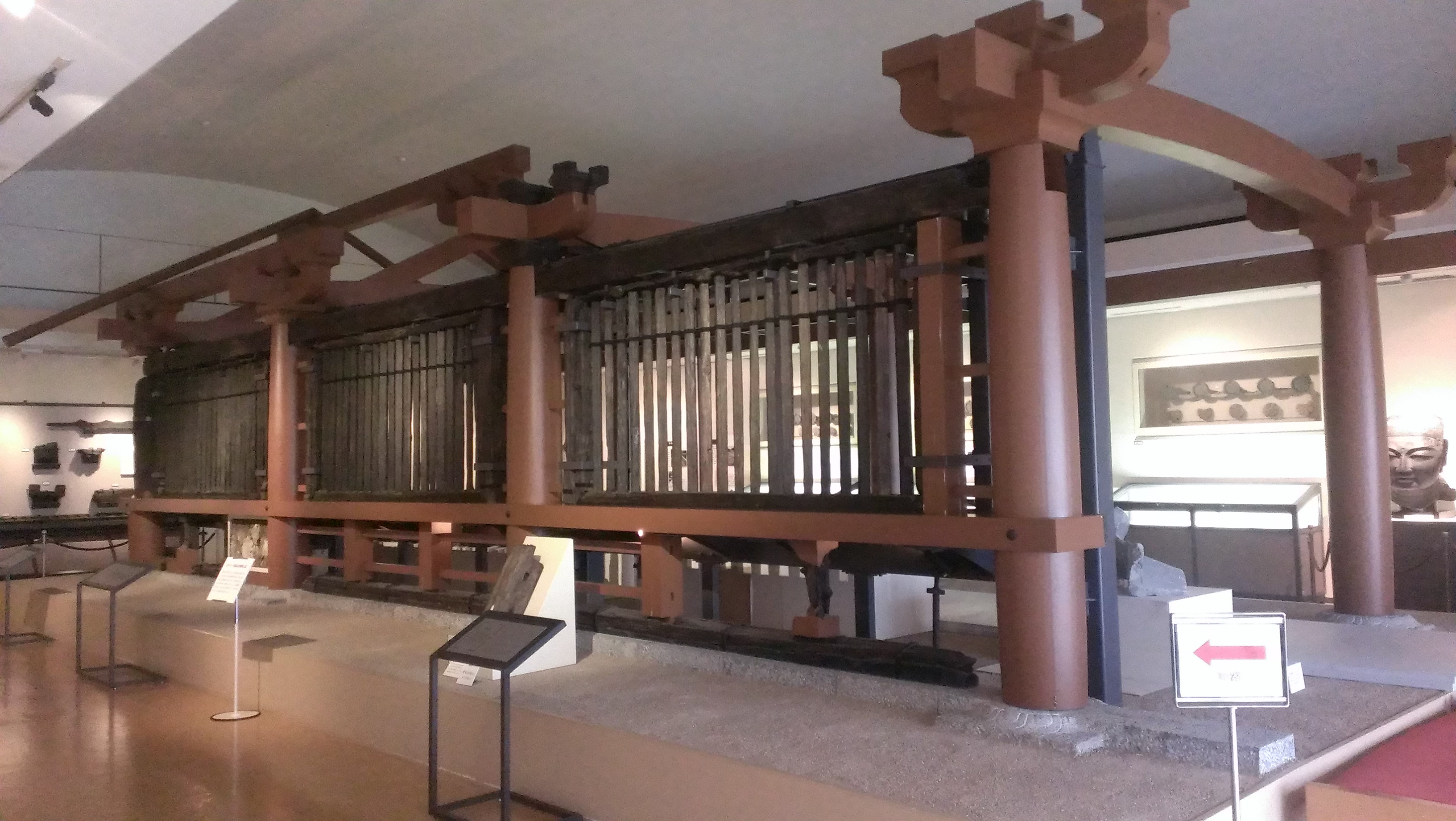 山田寺跡出土品 東回廊部材 平成19年（2007年）6月重要文化財指定 奈良文化財研究所飛鳥資料館